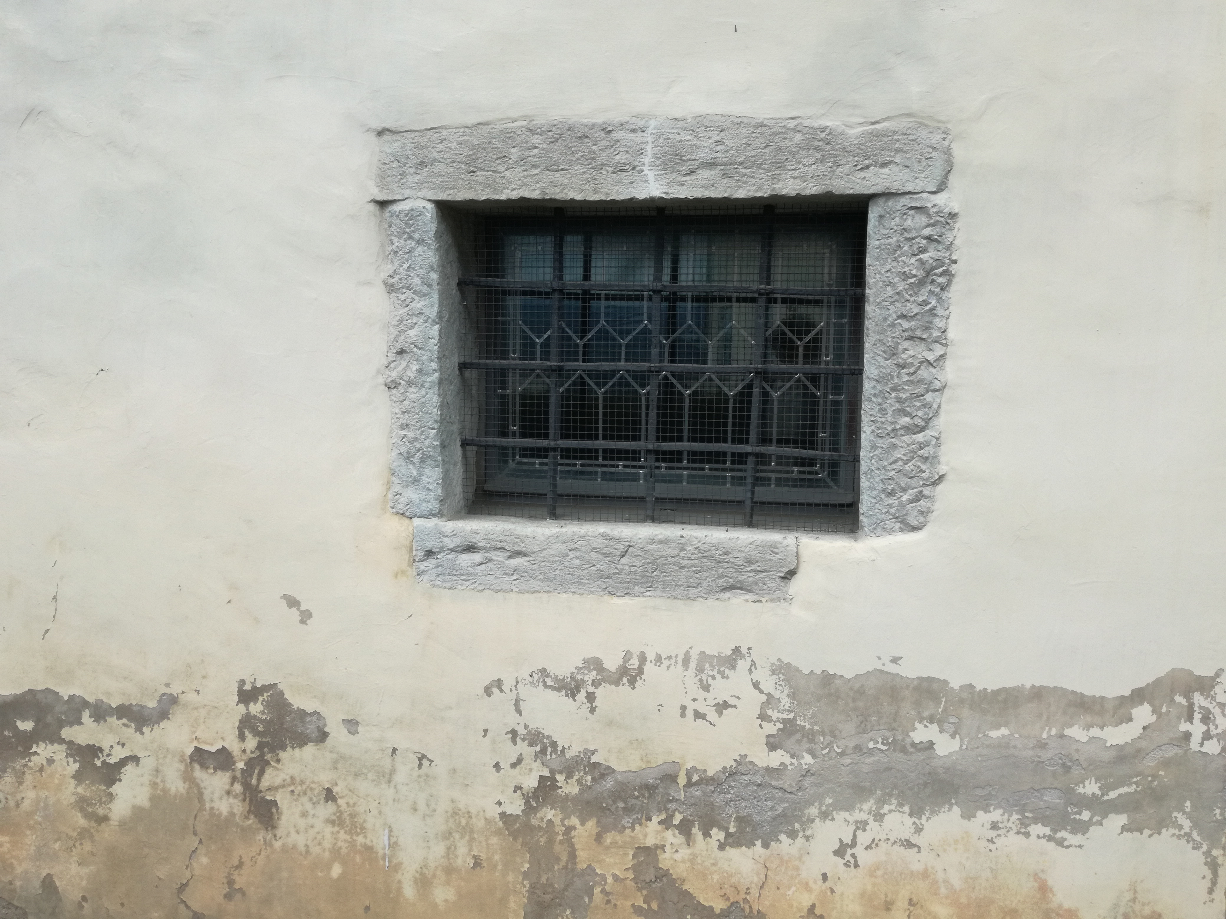 una delle poche e piccolissime aperture presenti nella Chiesa